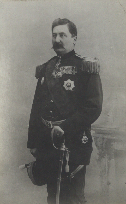 El general Cincar-Marković, primer ministro, muerto en el golpe de Estado de 1903.